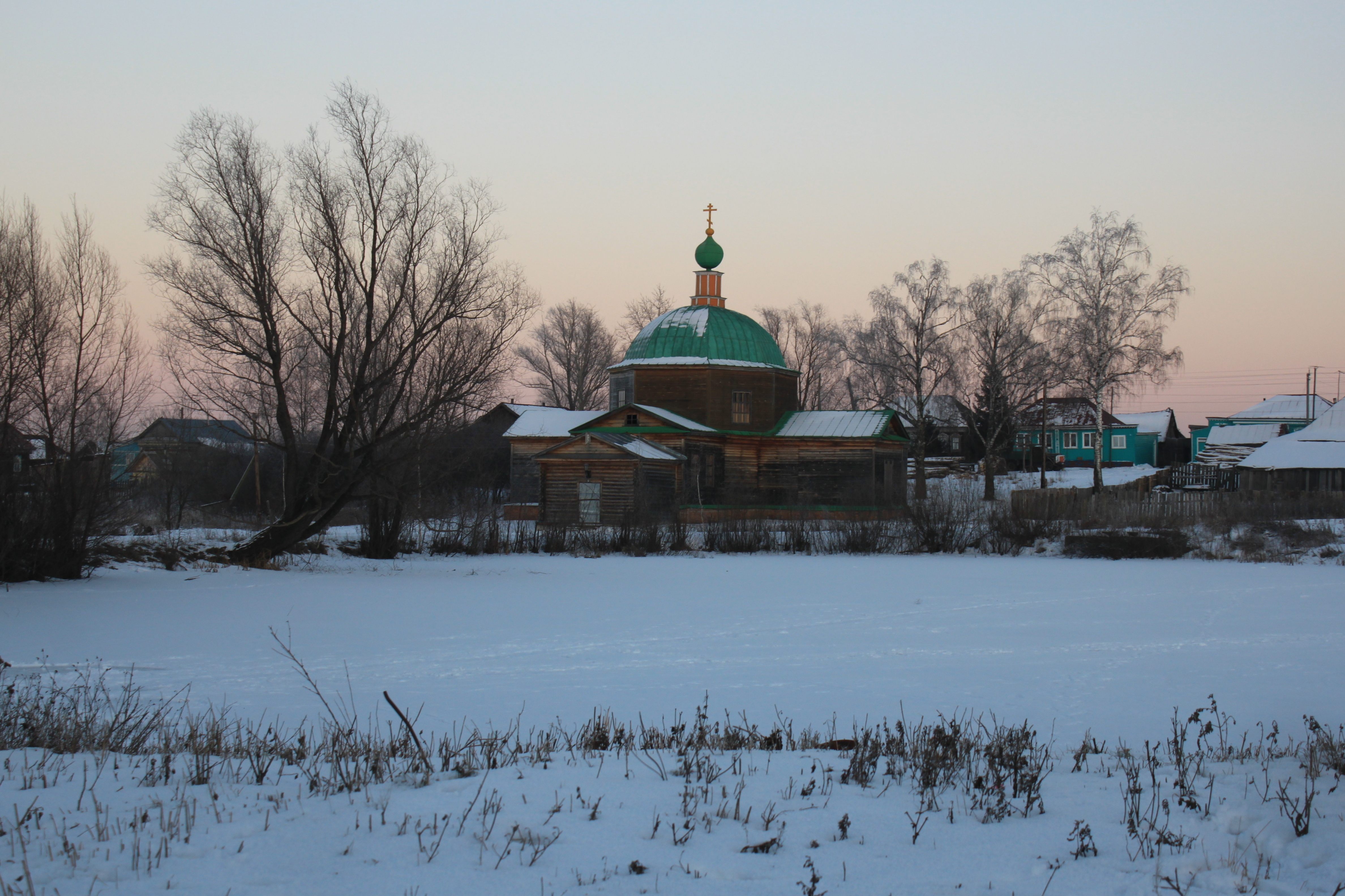 Воскресенская церковь 1652 года в Костылихе Арзамасский район